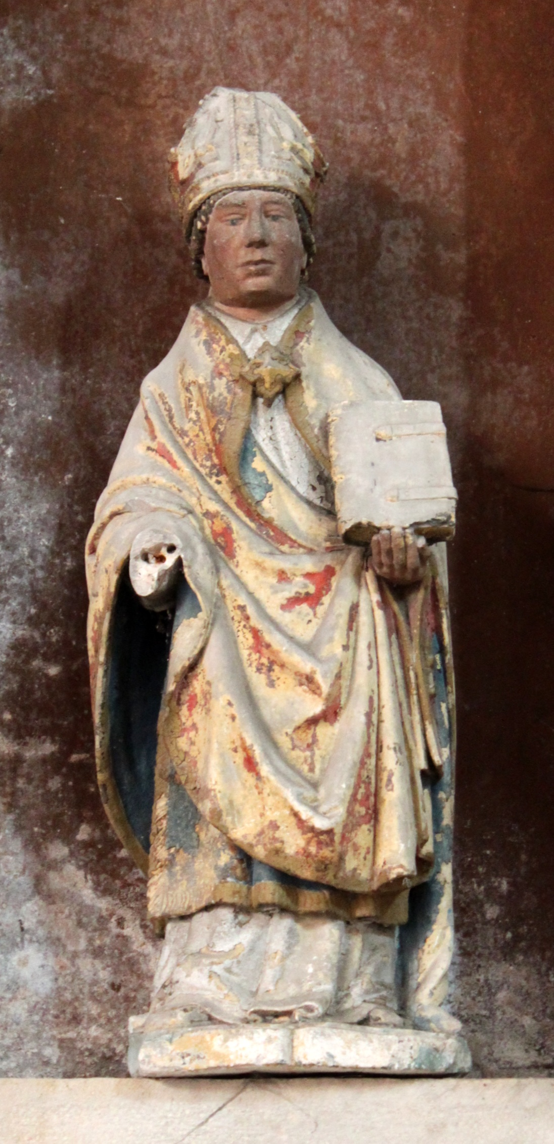 Collégiale Saint-Lazare d'Avallon, Avallon, Yonne, France